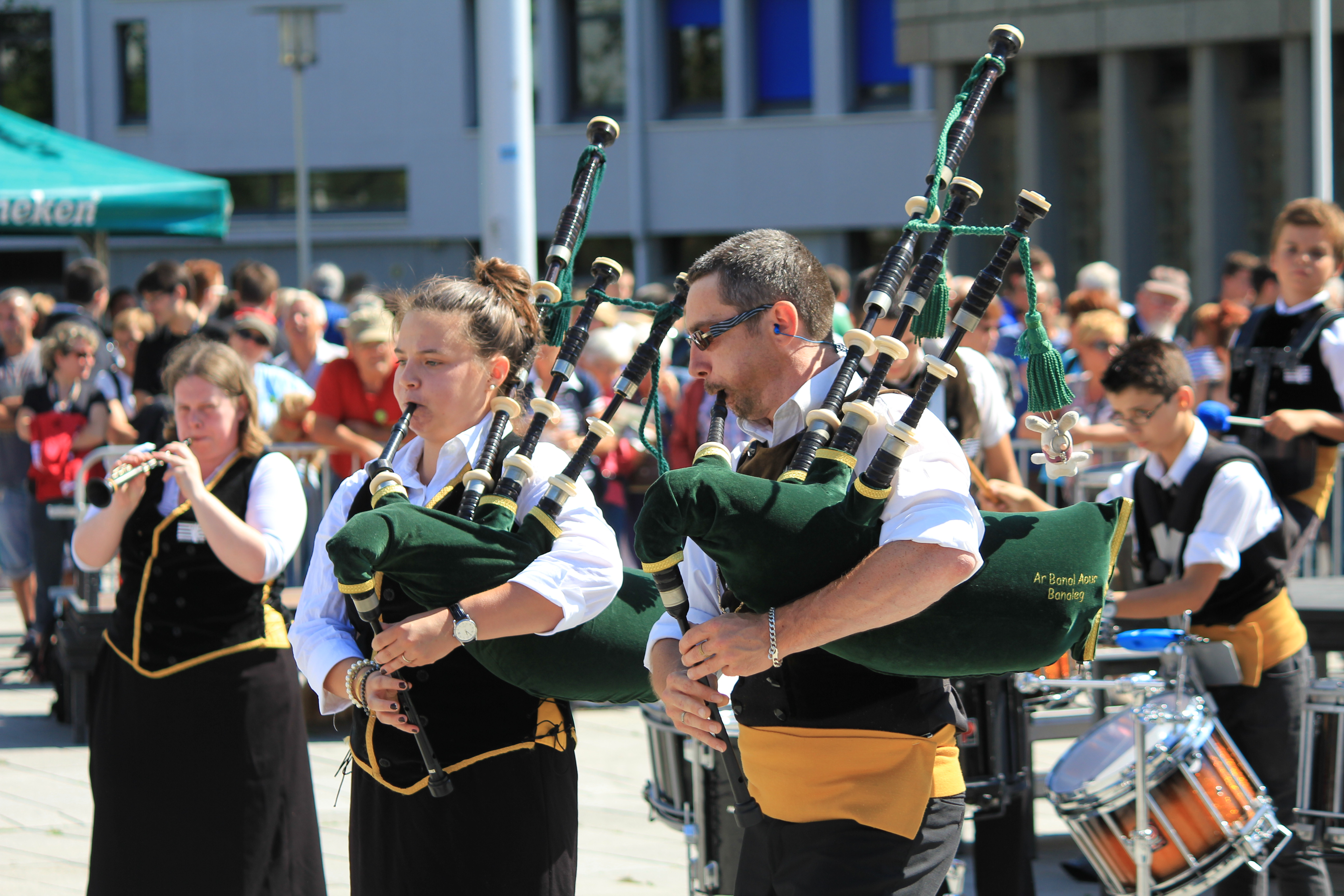 Le Bagad Ar Balan Aour lors du concours d'été de 4e catégorie B du championnat national des bagadoù, organisé dans le cadre du festival interceltique de Lorient 2014.